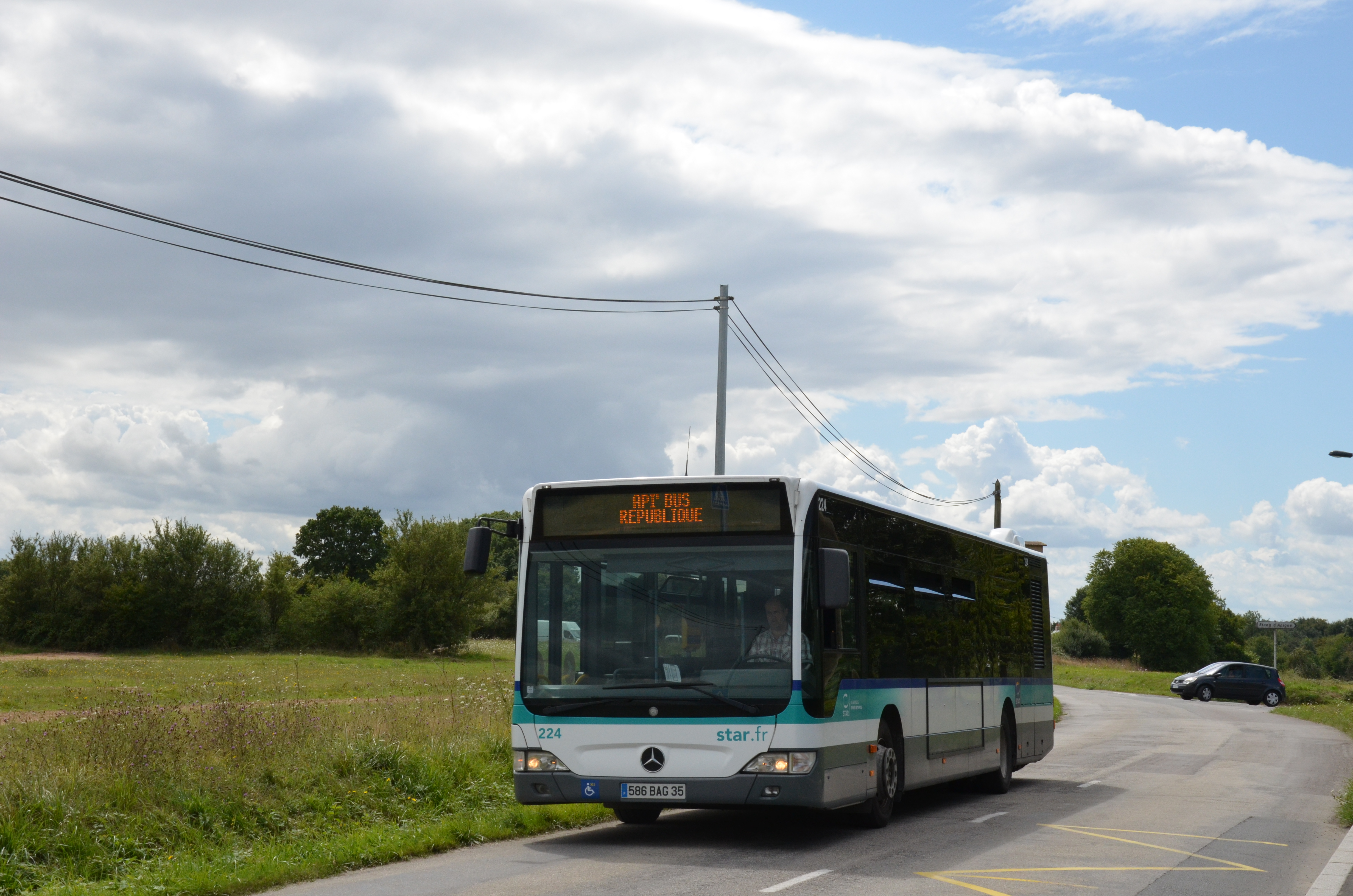 Mercedes Citaro n°224 sur la ligne API'BUS, en approche de l'arrêt Étangs d'Apigné sur le réseau STAR de Rennes.